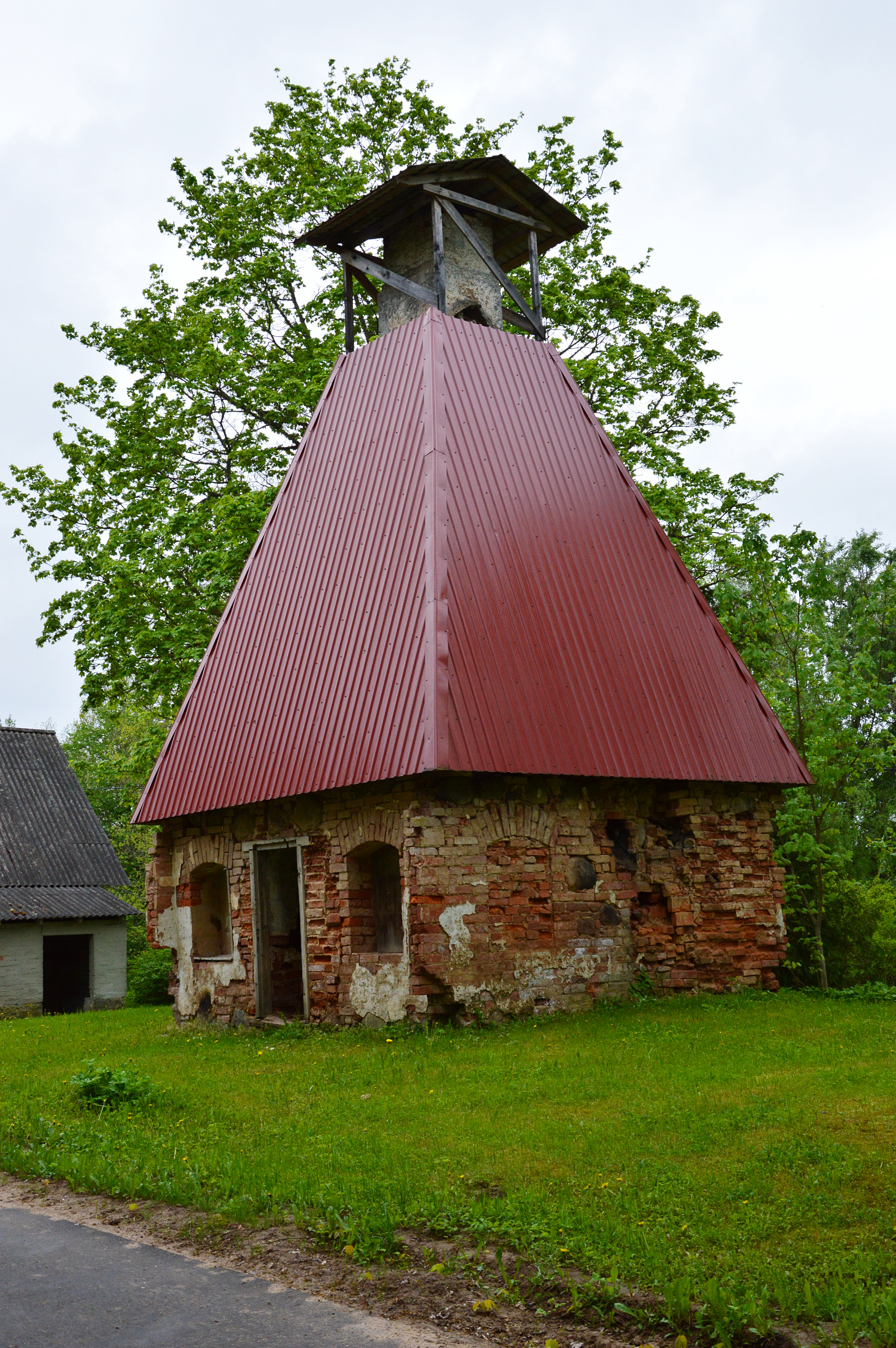 Orava mõisa teenijatemaja mantelkorsten.